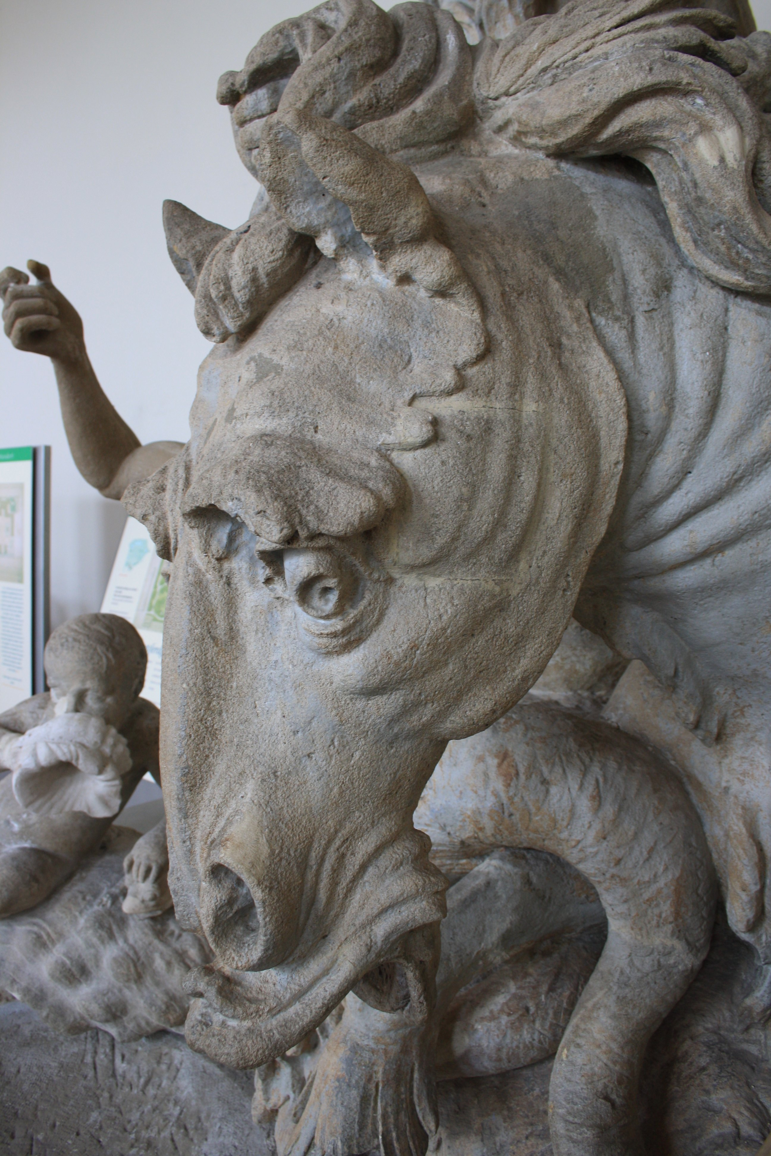 Ross Nahaufnahme